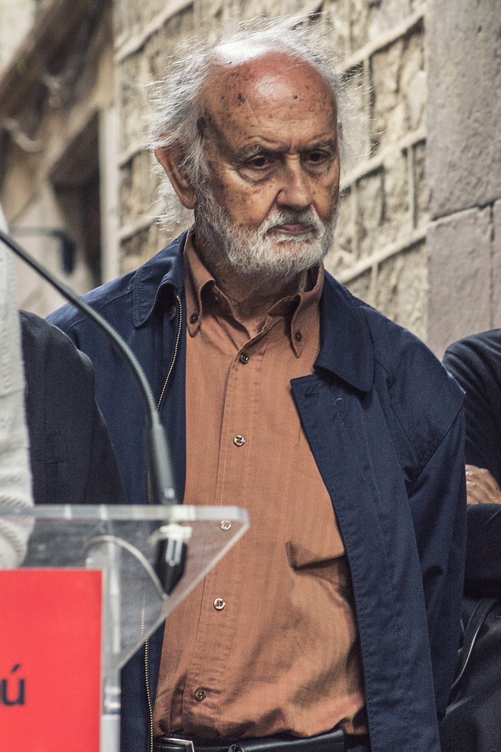 Plaça Sant Felip Neri 19/05/2015 Foto: Marc Lozano